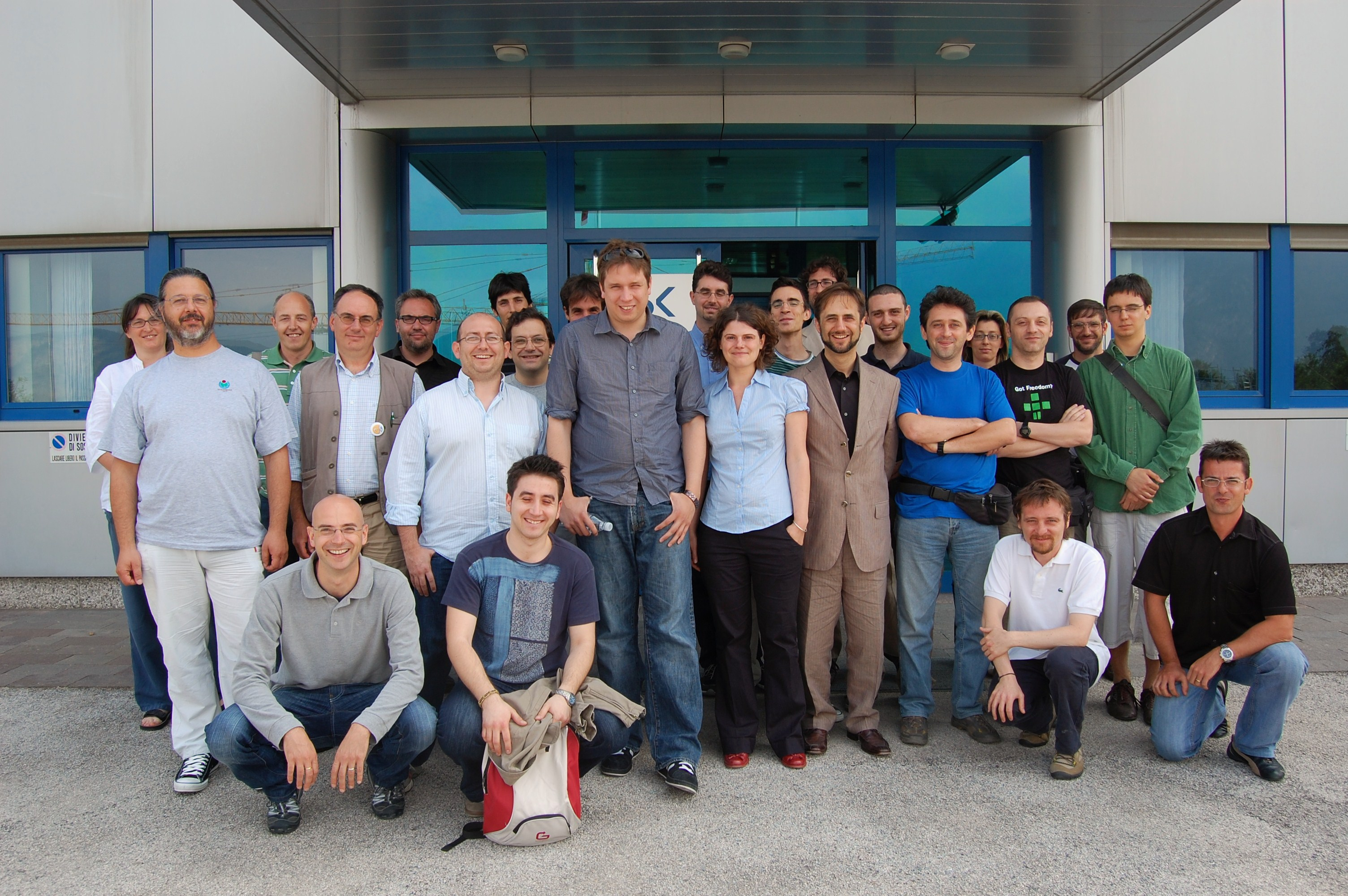 Foto di gruppo dei partecipanti alla prima convention italiana di OSM: OSMit, tenuta a trento nei giorni 5 e 6 giugno 2009